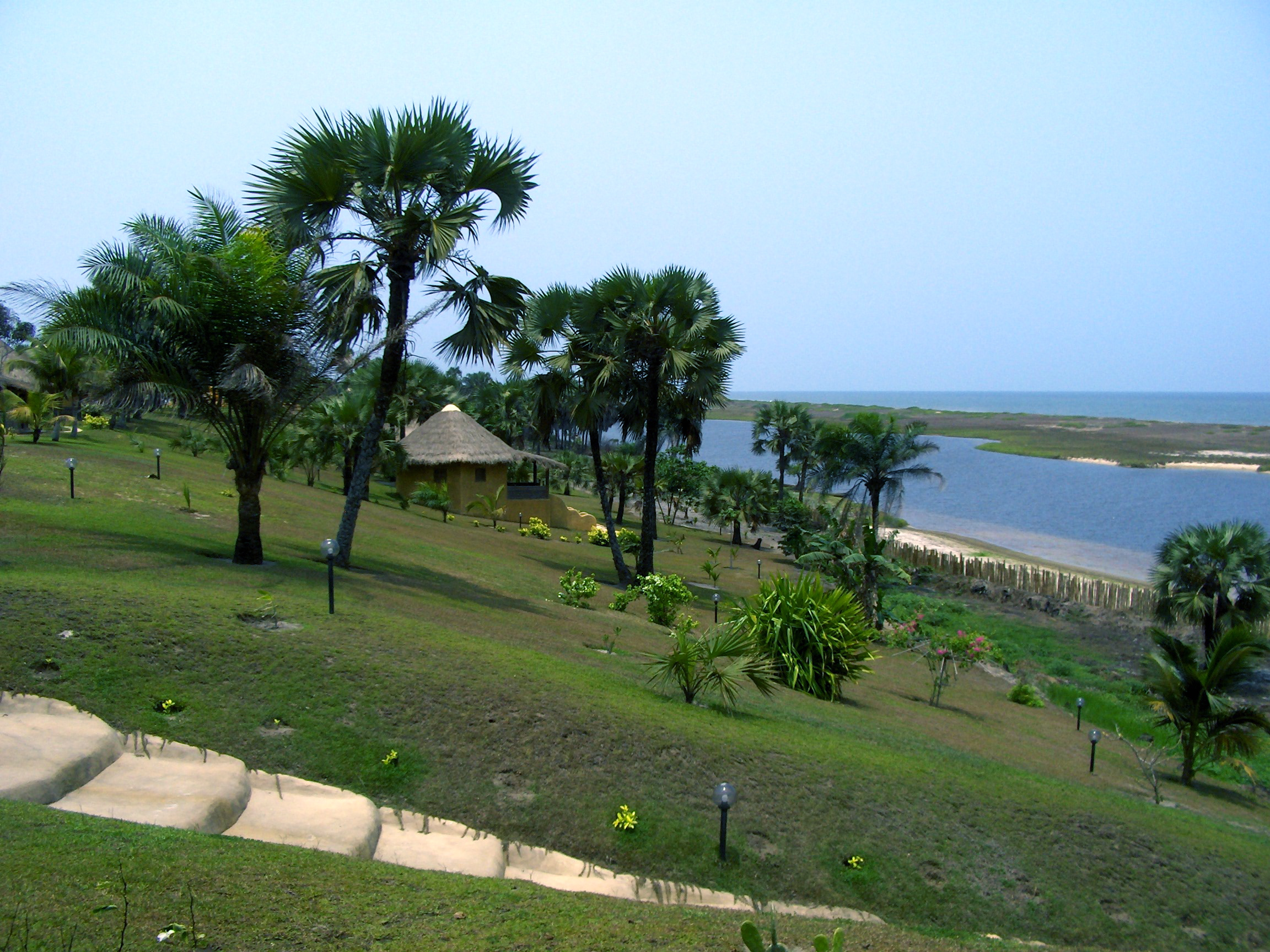 Les collines litorales touristiques de Djeno, en bordure de ville.